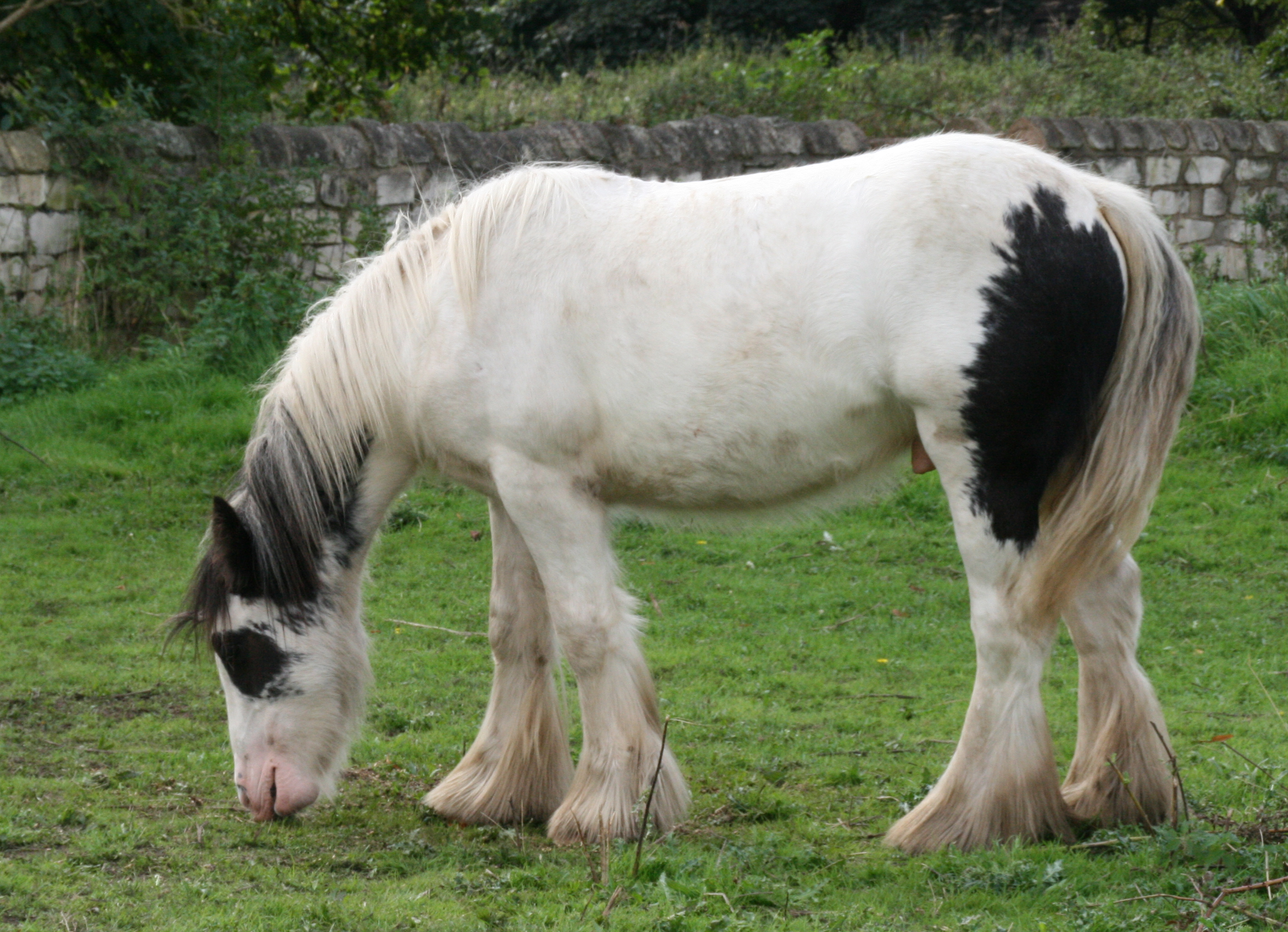 A black pinto grazing